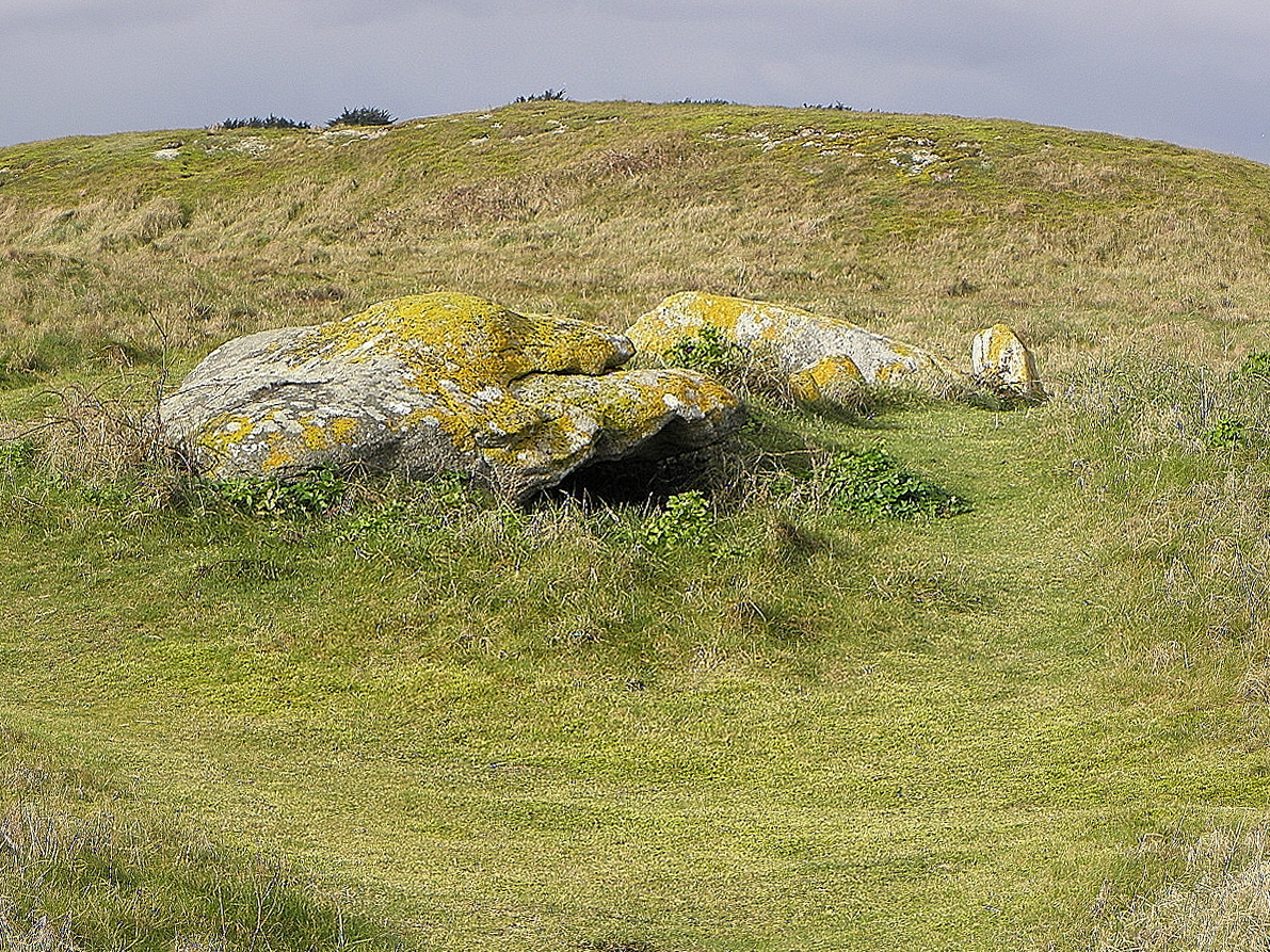 Allée couverte de Pont-ar-Bleiz en Lampaul-Ploudalmézeau (29).